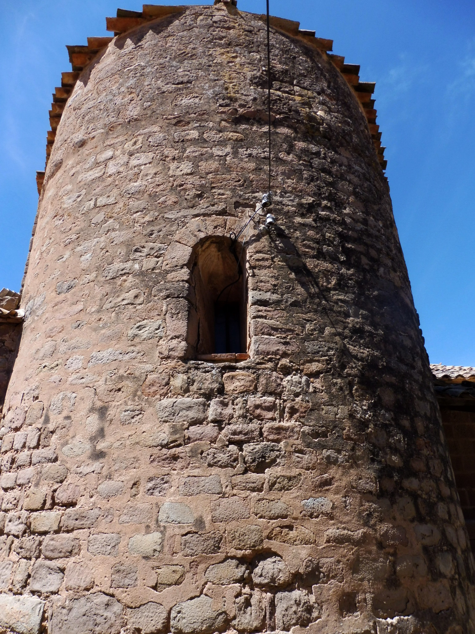 Església de Santa Fe de Valldeperes (Navàs): absis